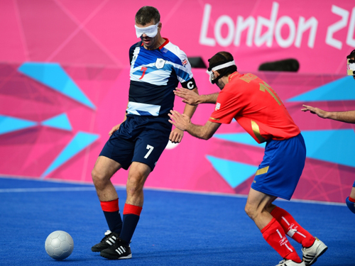 كرة قدم للمكفوفين